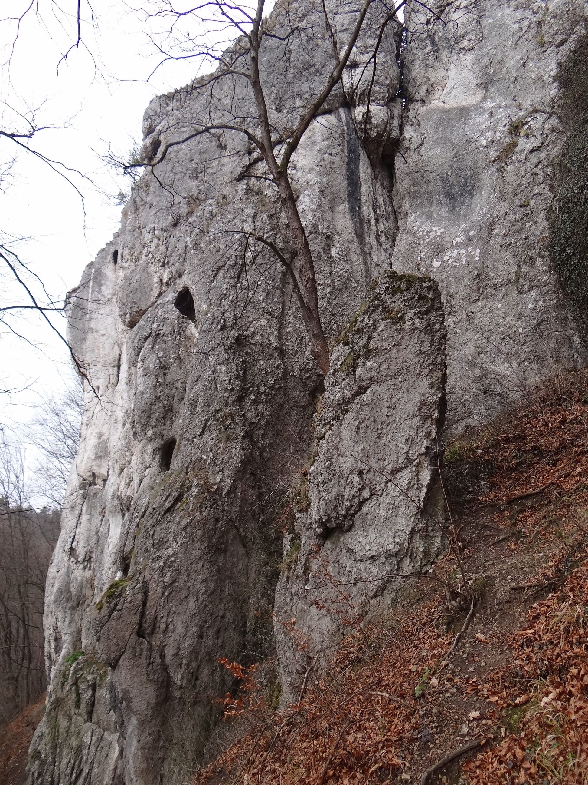 Szeroka Turnia w Dolinie Kobylańskiej